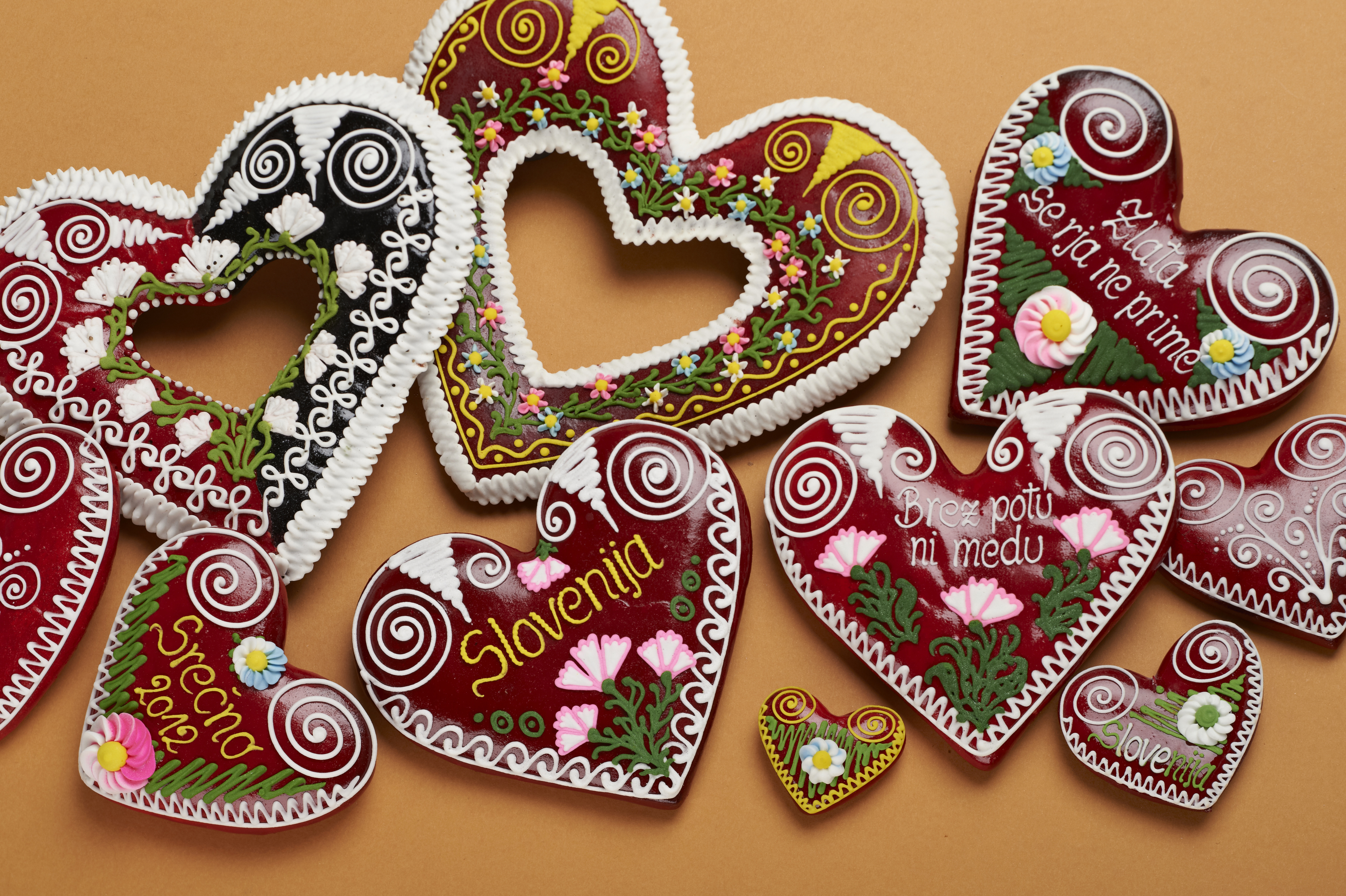 Tradicionalna lectova srca narejena v medičarsko-lectarskih delavnicah družine Perger 1757 iz Slovenj Gradca.